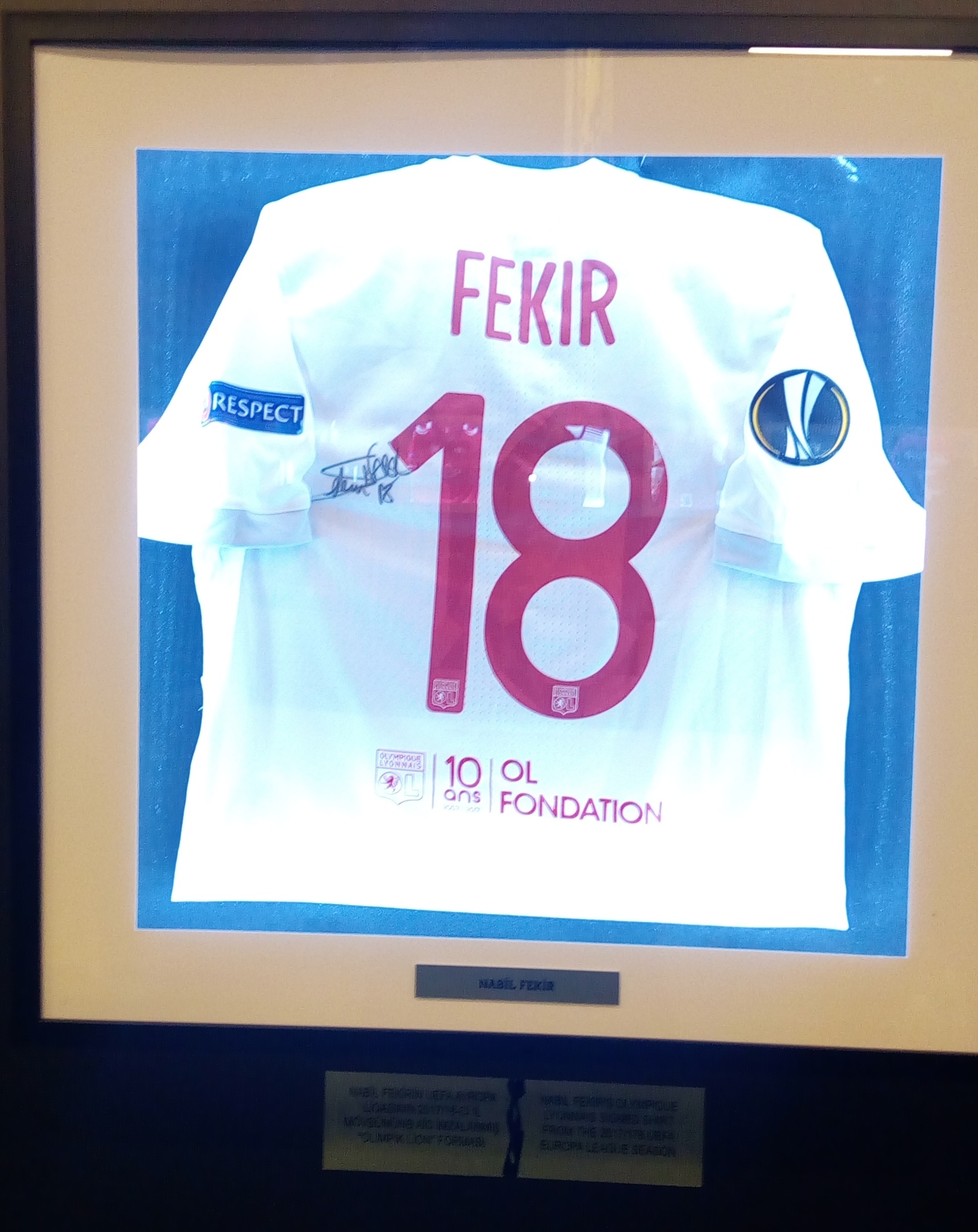 Avropa Liqası Muzeyi Bakıda